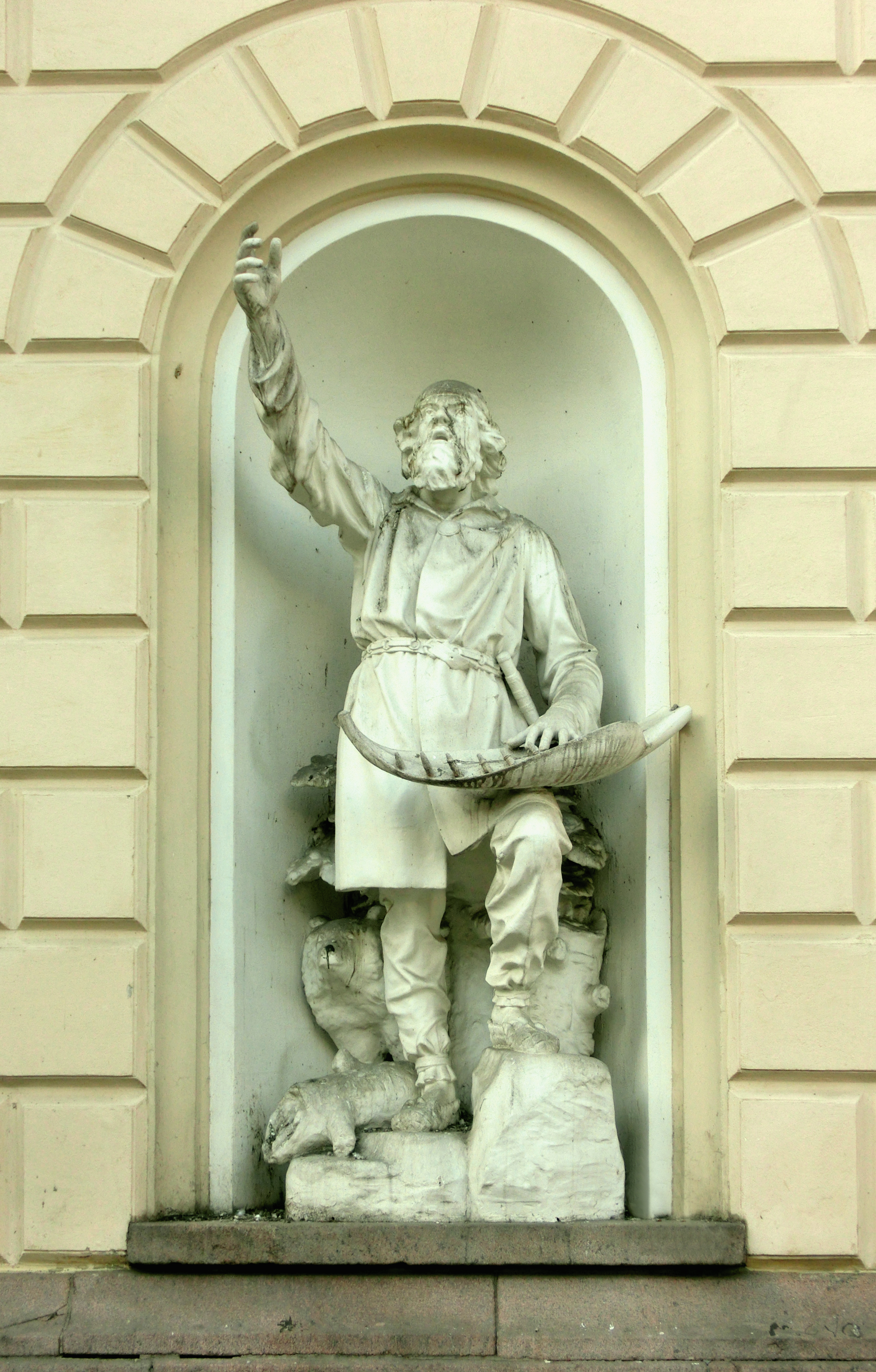 Väinämöinen mit der Kantele. Statue von Robert Stigell (1852-1907) aus dem Jahr 1887. Helsinki, Mannerheimintie 3.